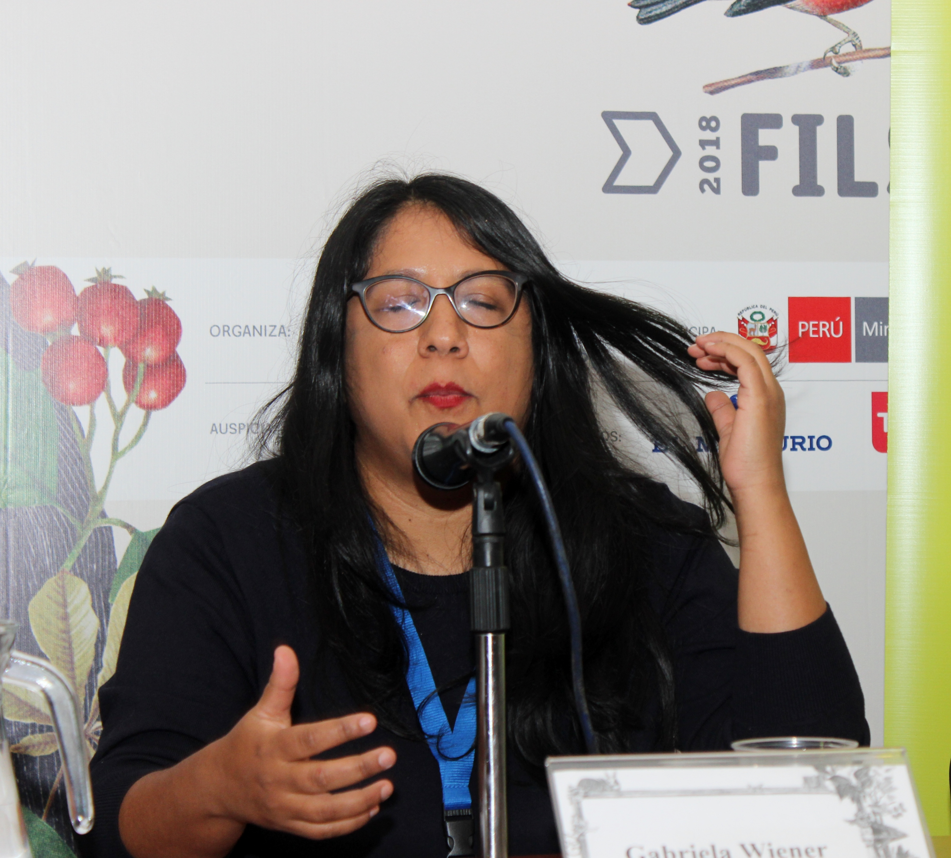 La escritora y periodista peruana Gabriela Wiener en la Feria Internacional del Libro de Santiago 2018